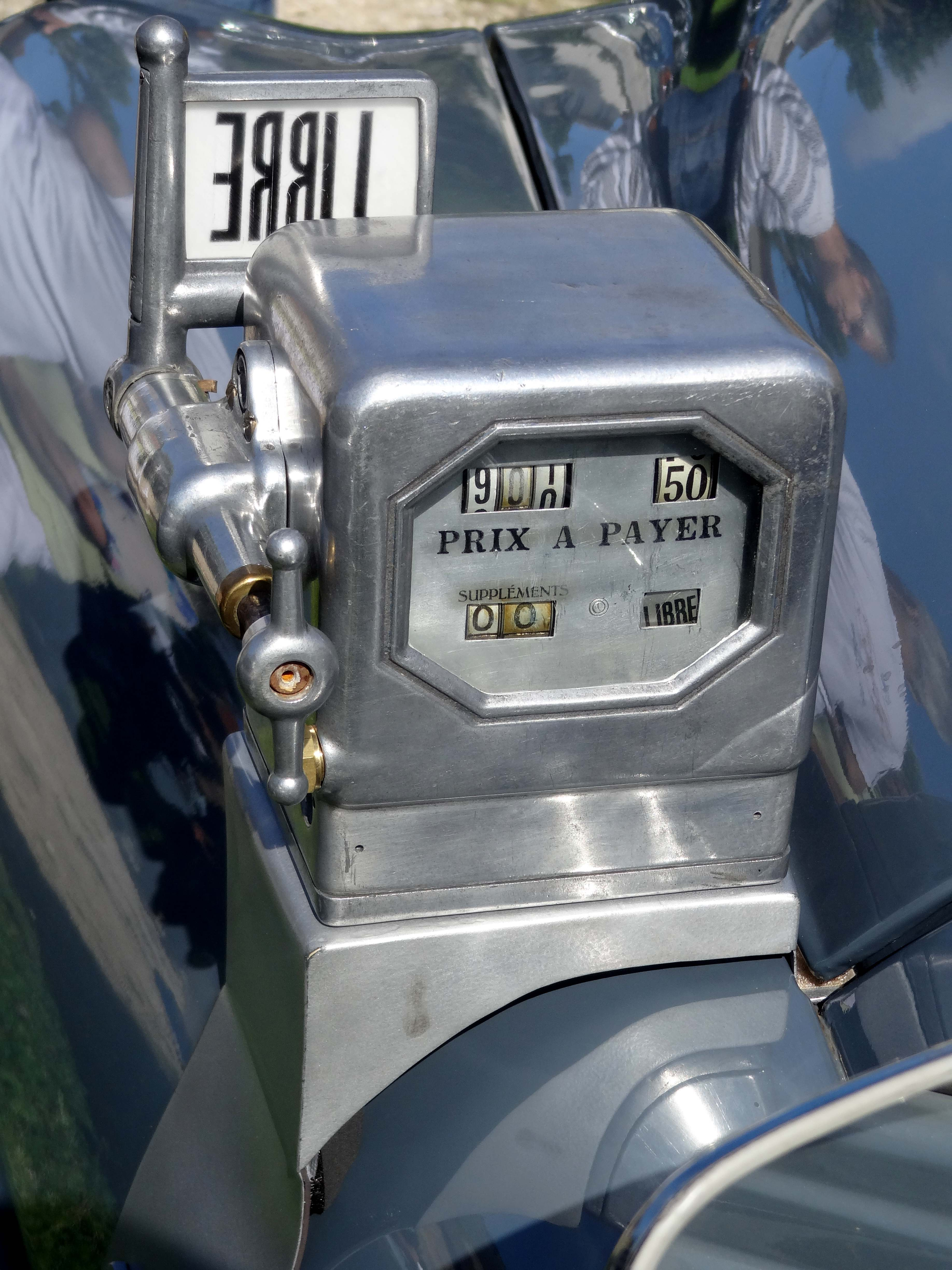 Taximètre, ancien modèle pour montage extérieur.